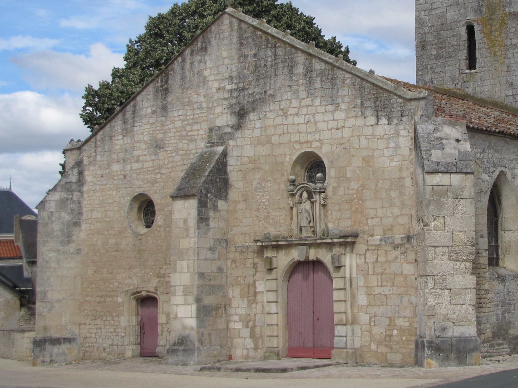 Église Saint-Hilaire de Nalliers, (Inscrit, 1989) .